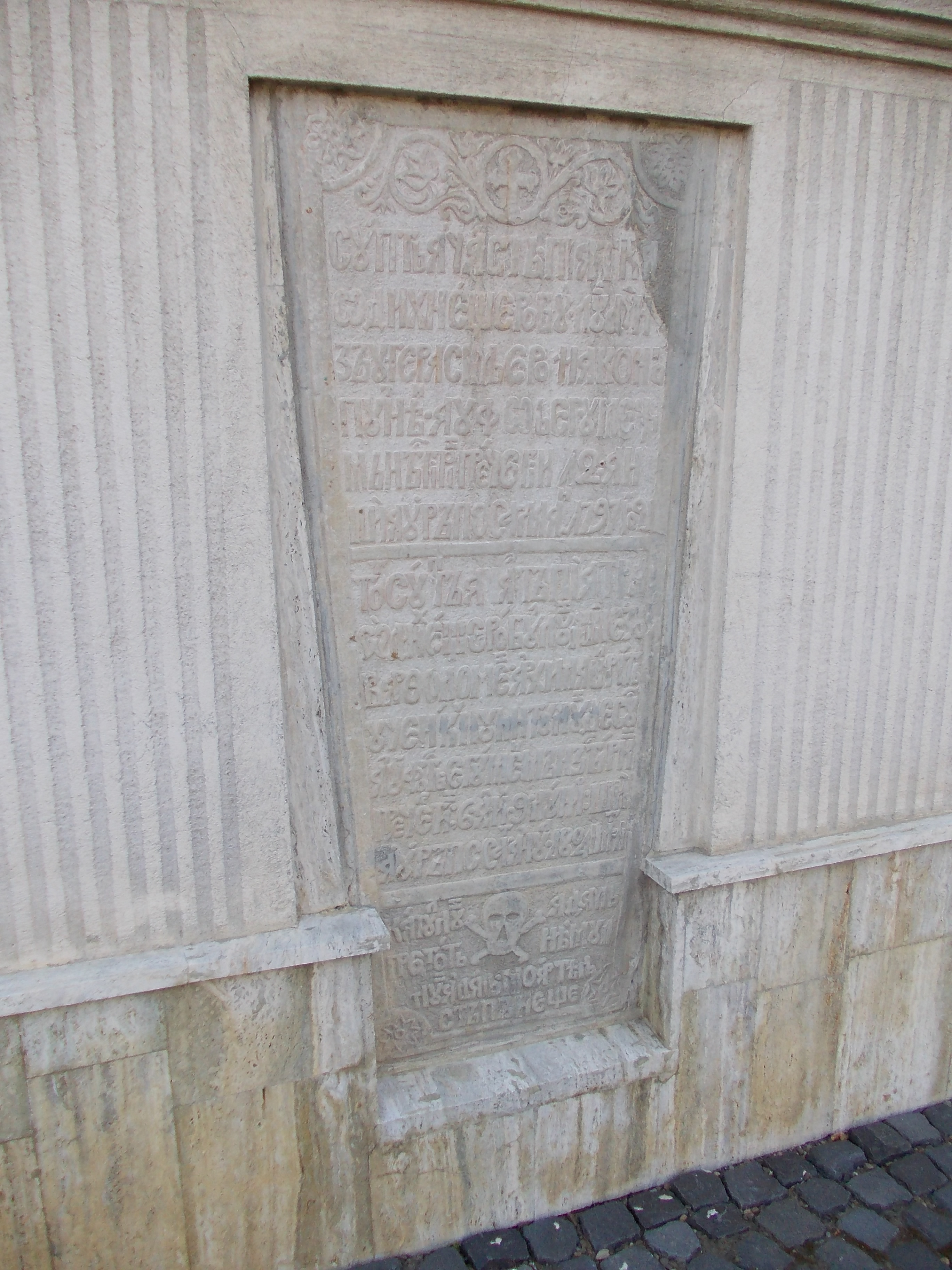 Mormântul episcopului Melchisedec Ștefănescu